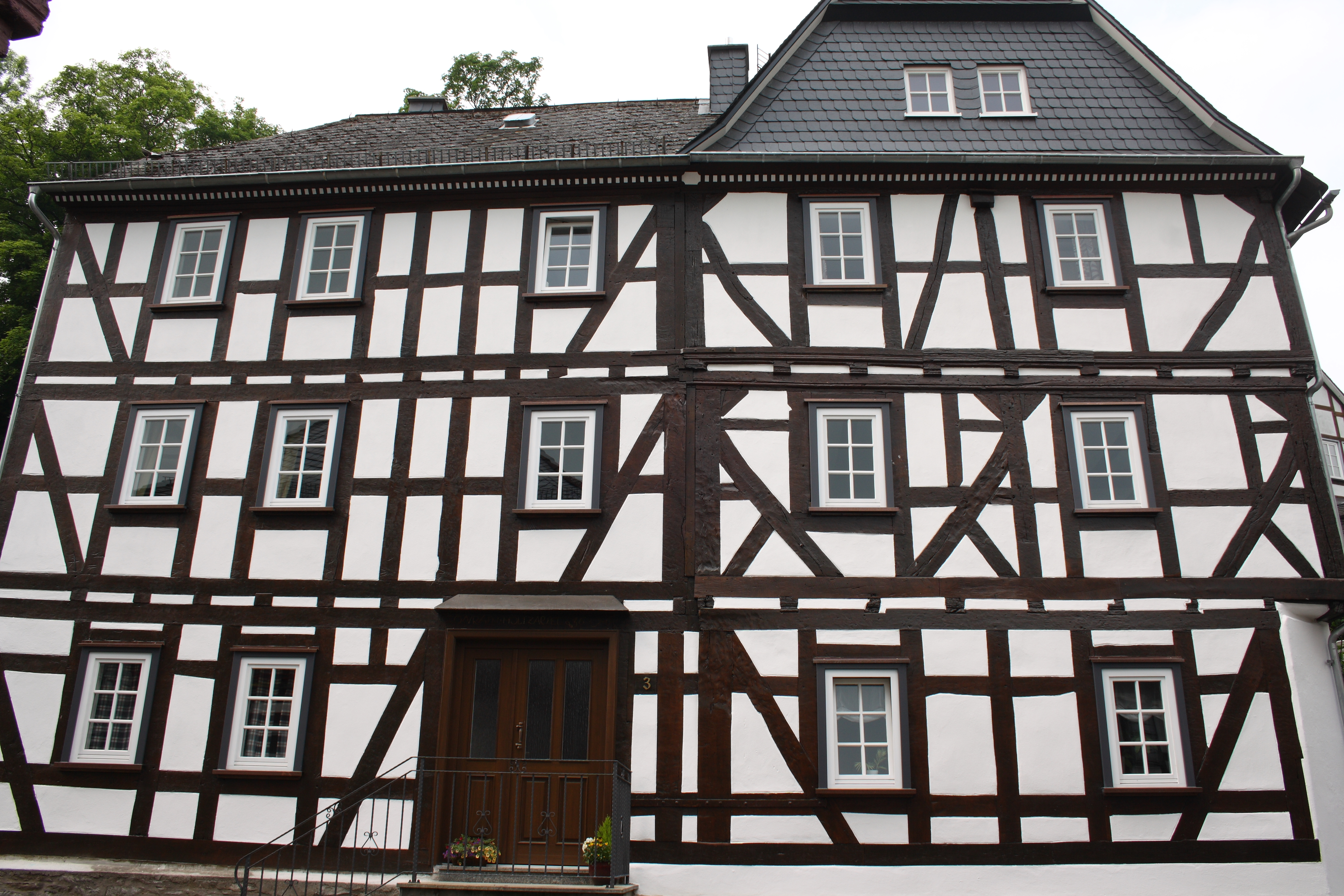 Haus Belzgasse 3 in Braunfels im Lahn-Dill-Kreis (Hessen)